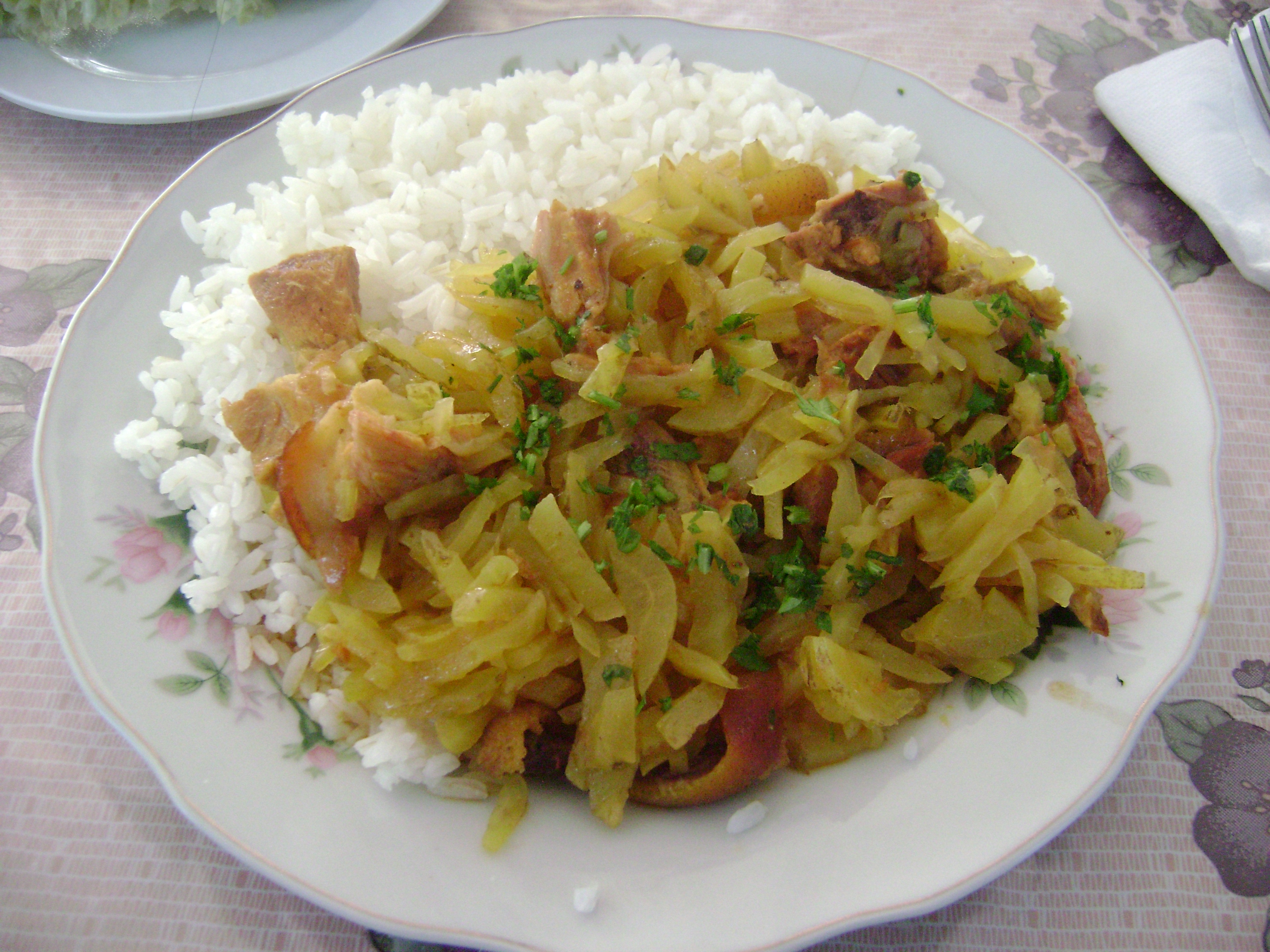 Olluquito guisado con carne de cerdo y acompañado con arroz blanco. Distrito de Uco, Provincia de Huari, Región Ancash.